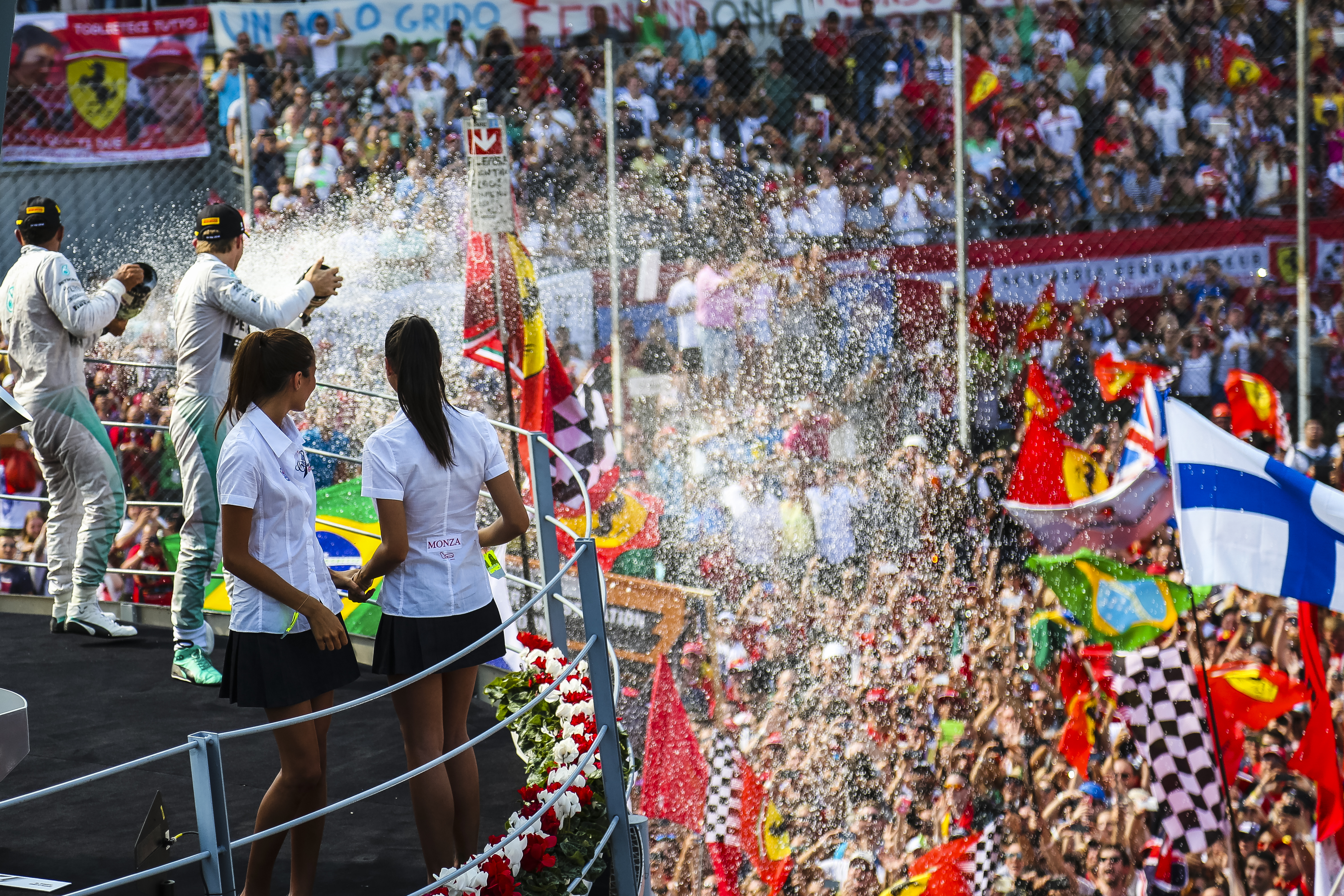 GP MONZA 2014